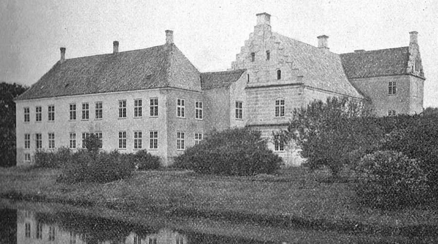 Lykkesholm er en gammel hovedgård, som nævnes første gang i 1329 og kaldt Magelund, kaldt Lykkesholm fra 1380. Er nu en avlsgård under Ravnholt Gods. Gården ligger ca. 21 km sydøst for Odense i Ellested Sogn, Vindinge Herred, Ørbæk Kommune. Hovedbygningen er opført i 1600 ved Dominicus Baetiaz og ombygget i 1668-1784-1786. Lykkesholm Slot er idag et hotel.